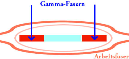 Muskelspindel; selbst erstellt; gemeinfrei